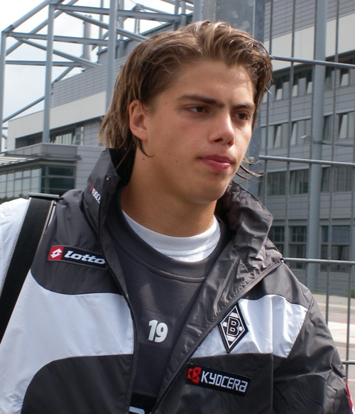 Frederic Löhe vor dem Trainng